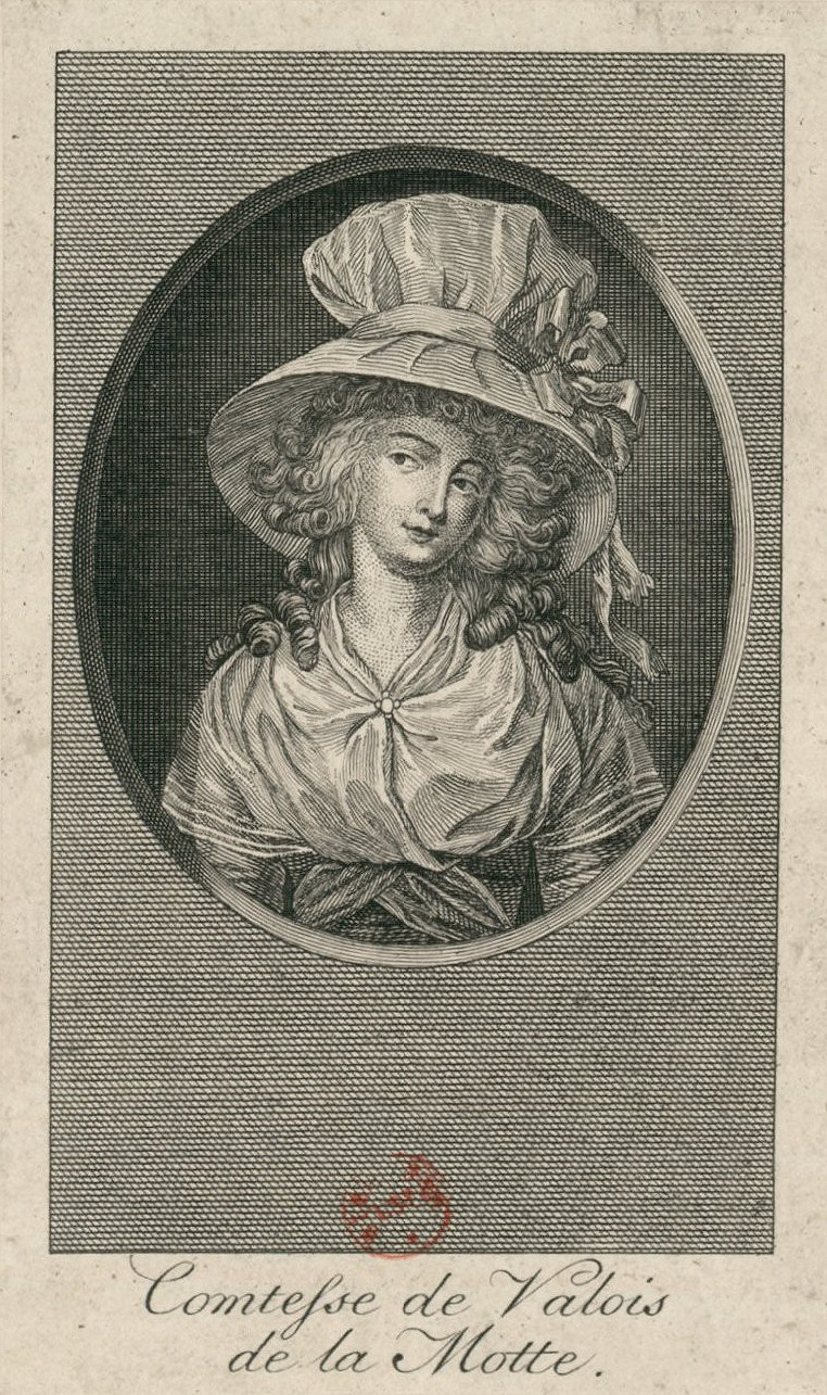 Porträt Jeanne de Saint-Rémys